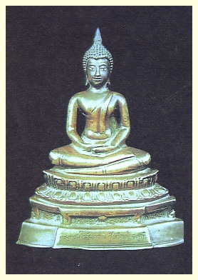 พระพุทธนิรโรคันตรายชัยวัตน์จตุรทิศ